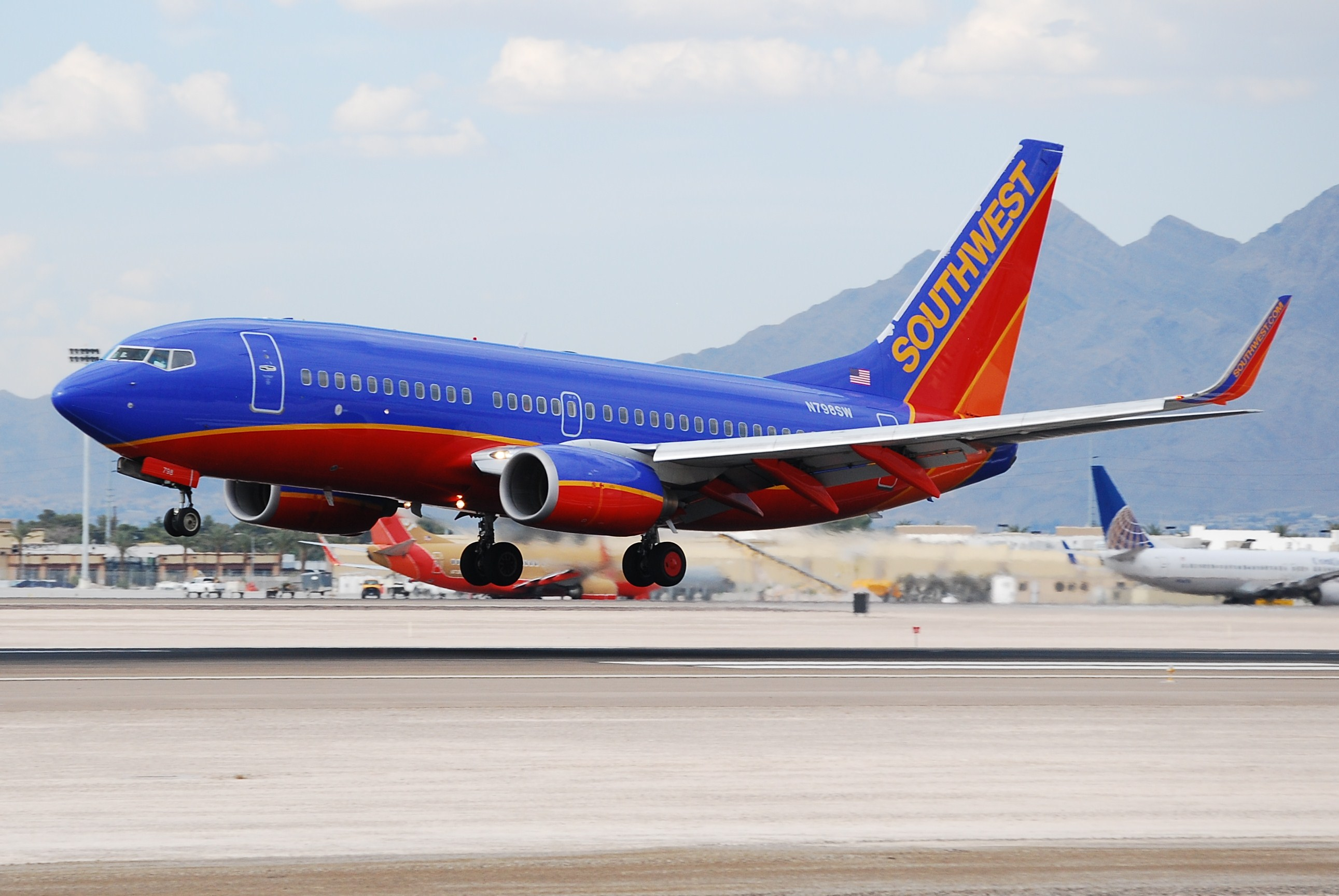 SOUTHWEST